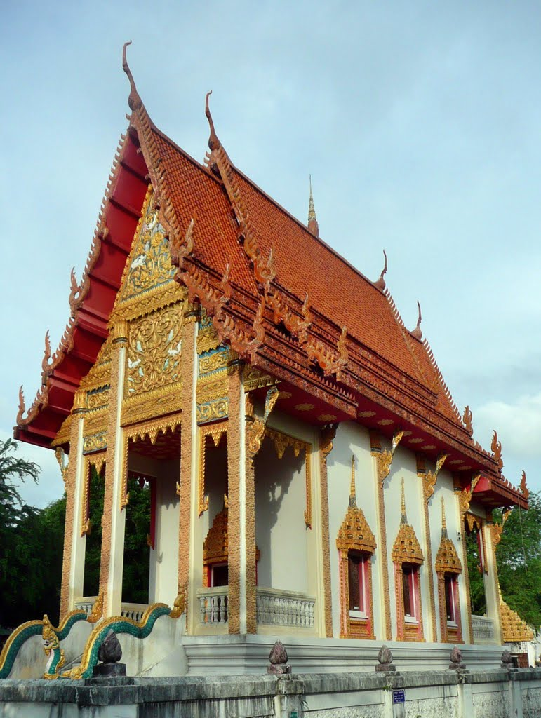 พระอุโบสถวัดโพธิ์ตาก อ.พิบูลมังสาหาร จ.อุบลราชธานี